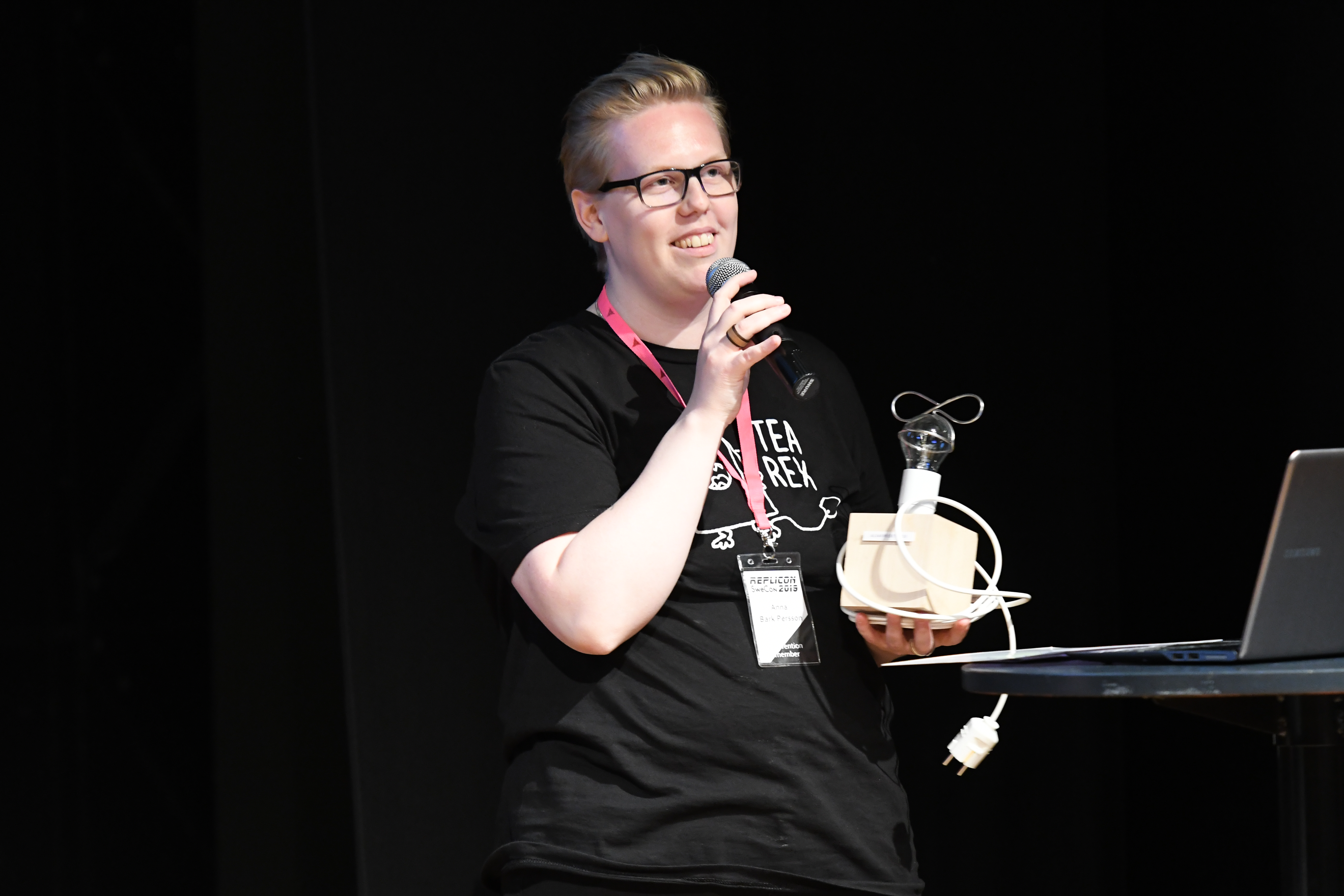 Swecon 2019 (Replicon) i Västerås. Anna Bark Persson, Alvarpristagare.